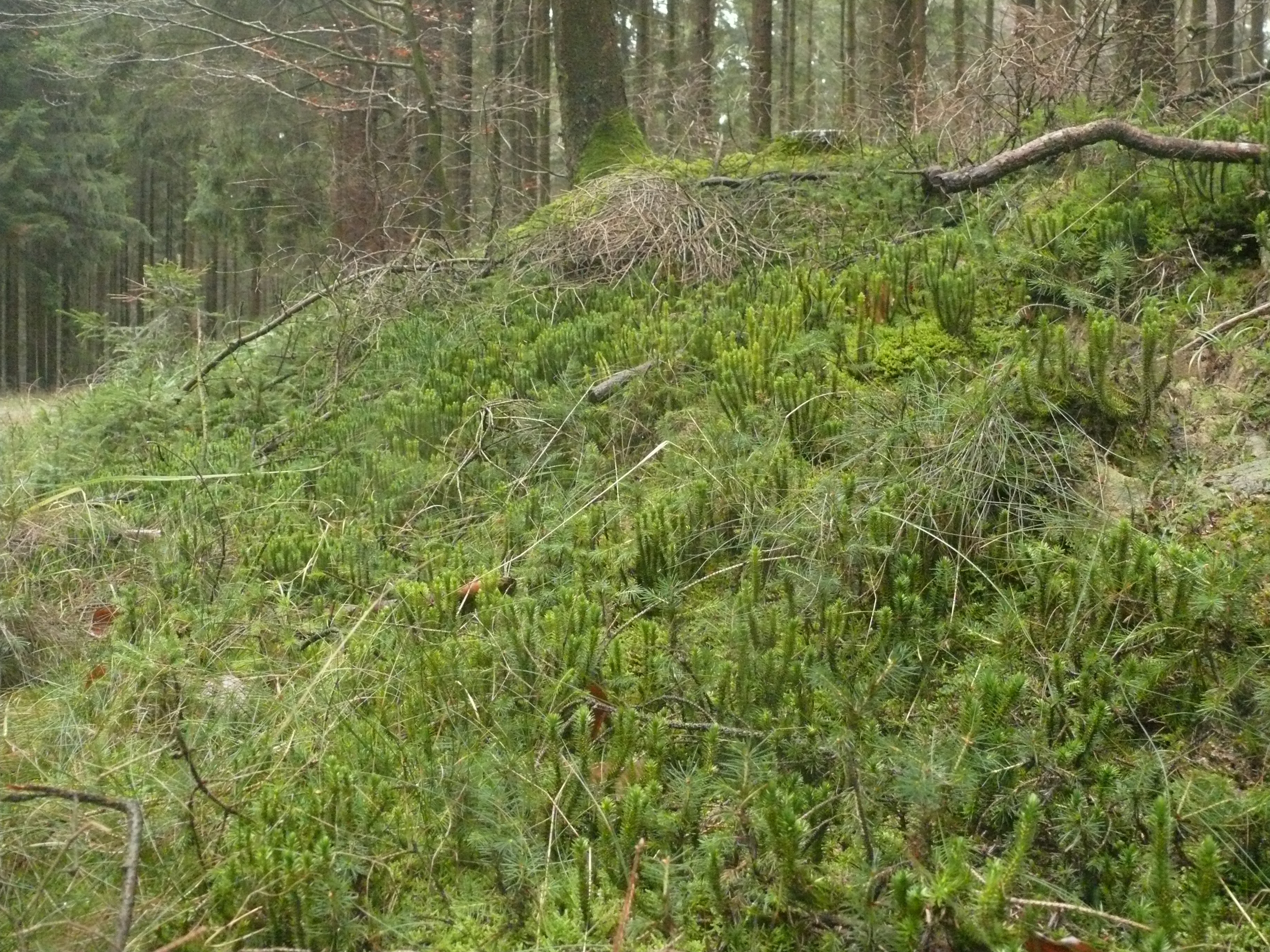 Huperzia selago, Virngrund